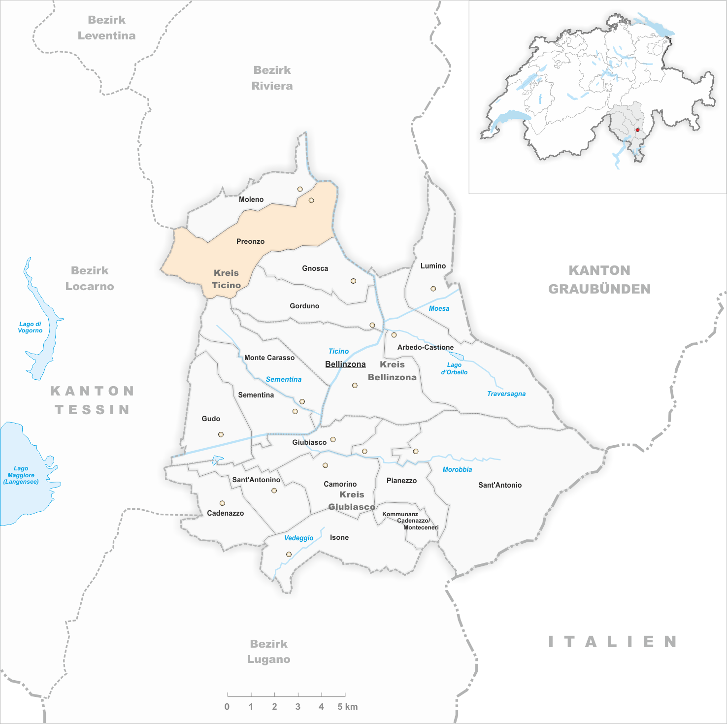 Municipality Preonzo